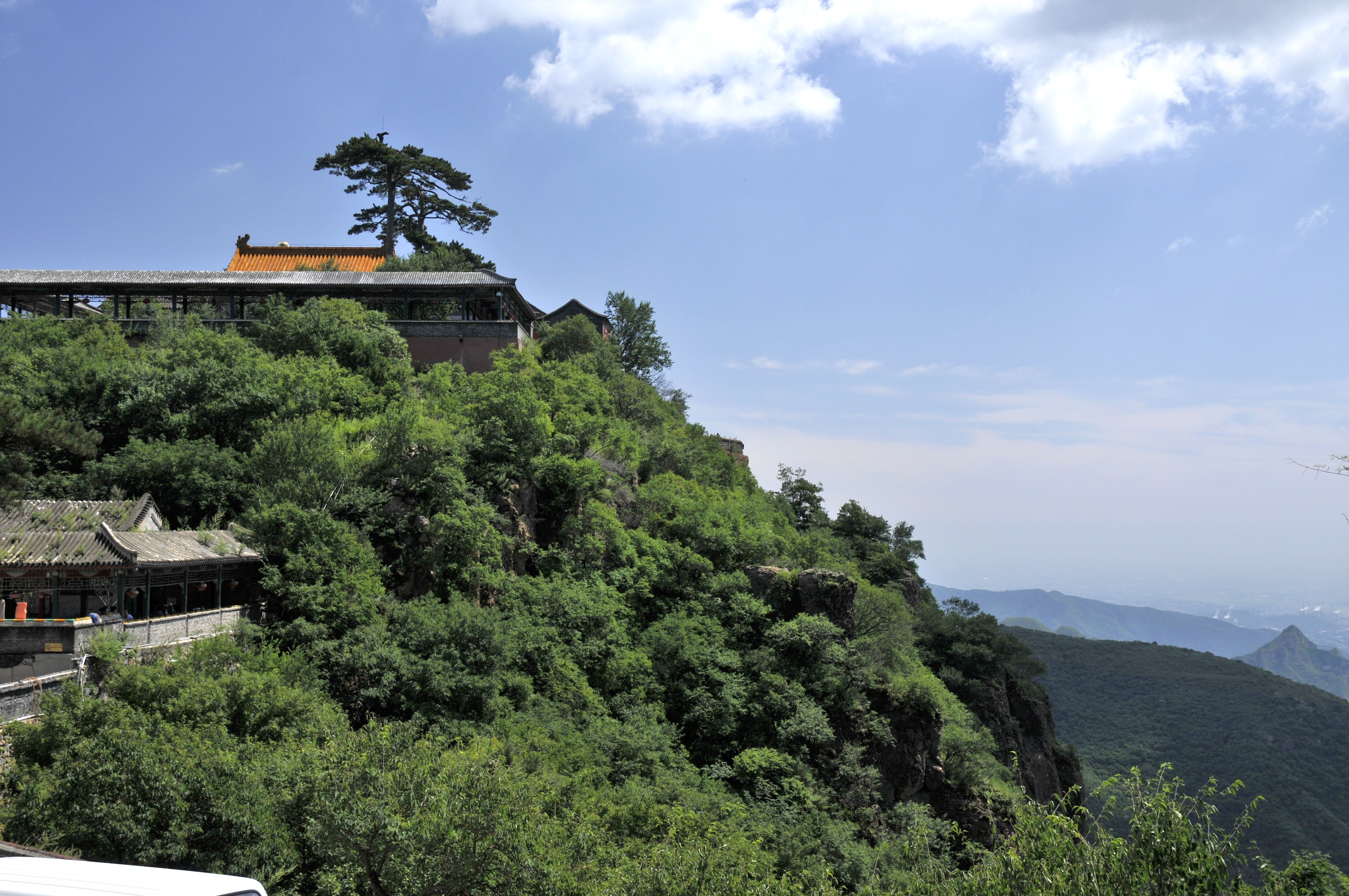 金顶妙峰山